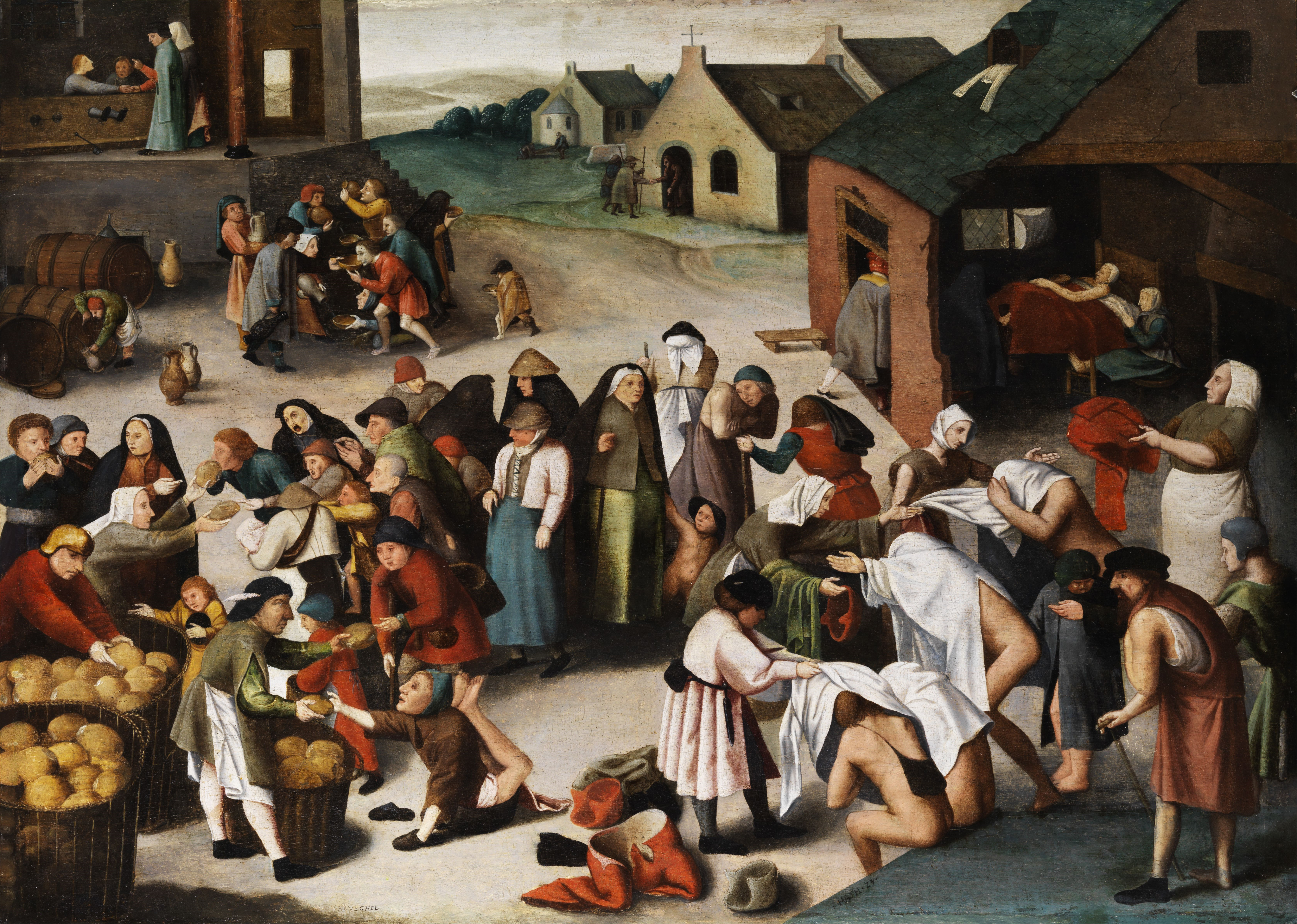 Die Werke der Barmherzigkeit, Öl auf Holz, 64 x 88,5 cm. Links unten bezeichnet "P. Brueghel", rechts unten bezeichnet "Ma?h-29 (79?)".